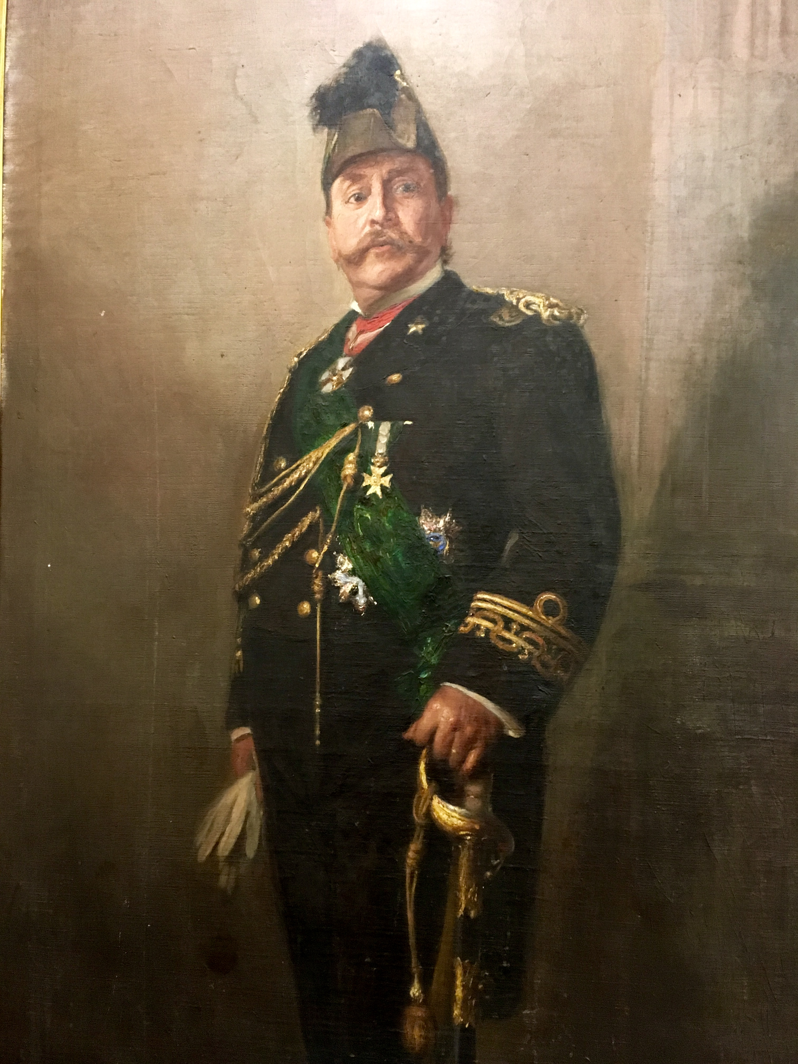 Pasquale Leonardi Cattolica - Napoli, 12 febbraio 1854 – Roma, 24 o 26 marzo 1924